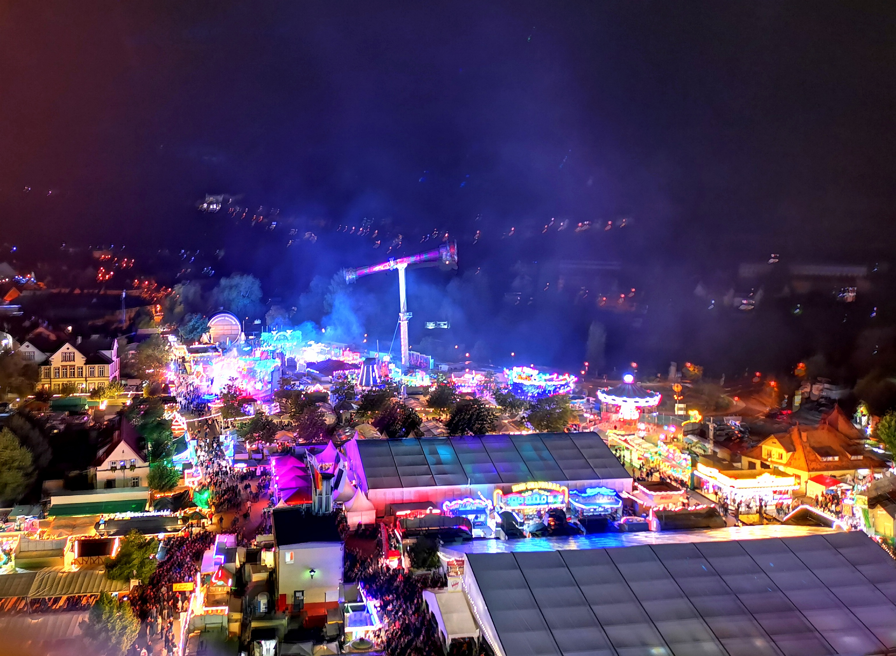 Wurstmarkt vom Jupiter Riesenrad aus bei Nacht (2019)